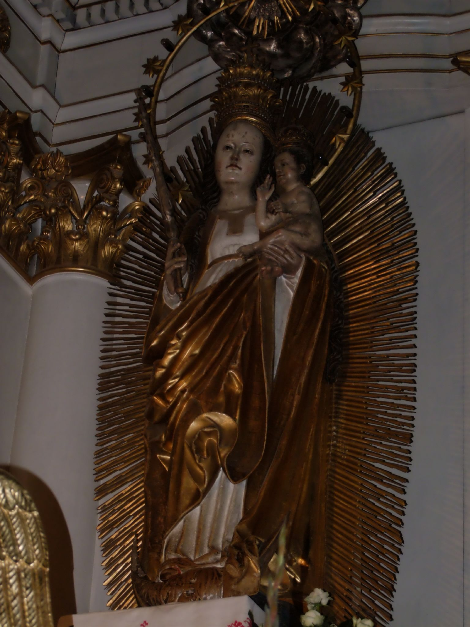 A csíksomlyói kegytemplom és kolostor Mária-kegyszobra.